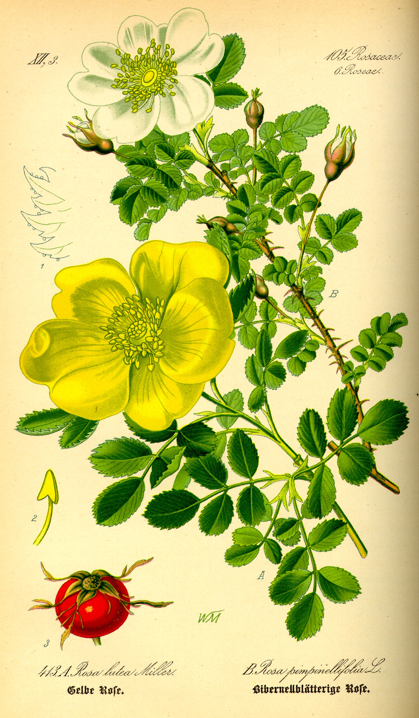 Name A. Rosa foetida Herrm., syn. Rosa lutea Mill. B. Rosa pimpinellifolia L., syn. Rosa spinosissima L. Family Rosaceae